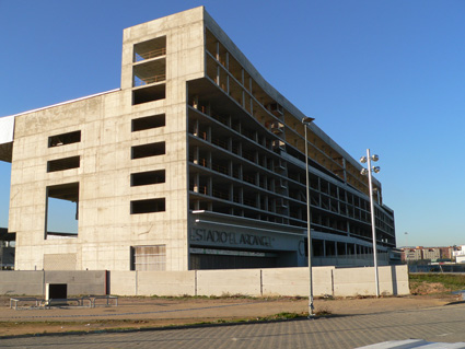 Foto de la nueva grada de preferencia en el estadio "El Arcángel" de Córdoba, España.